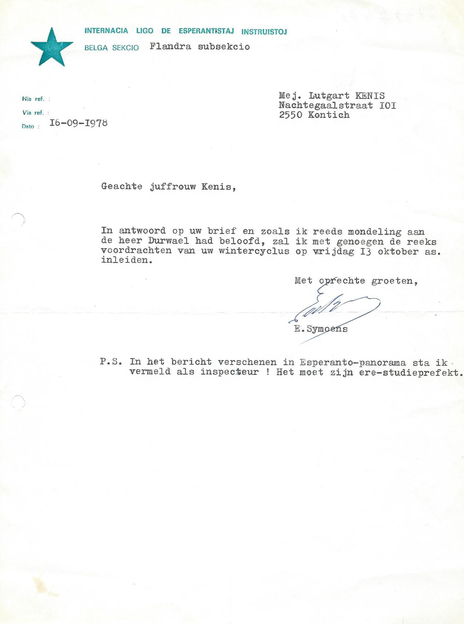 Letero de Edward Symoens